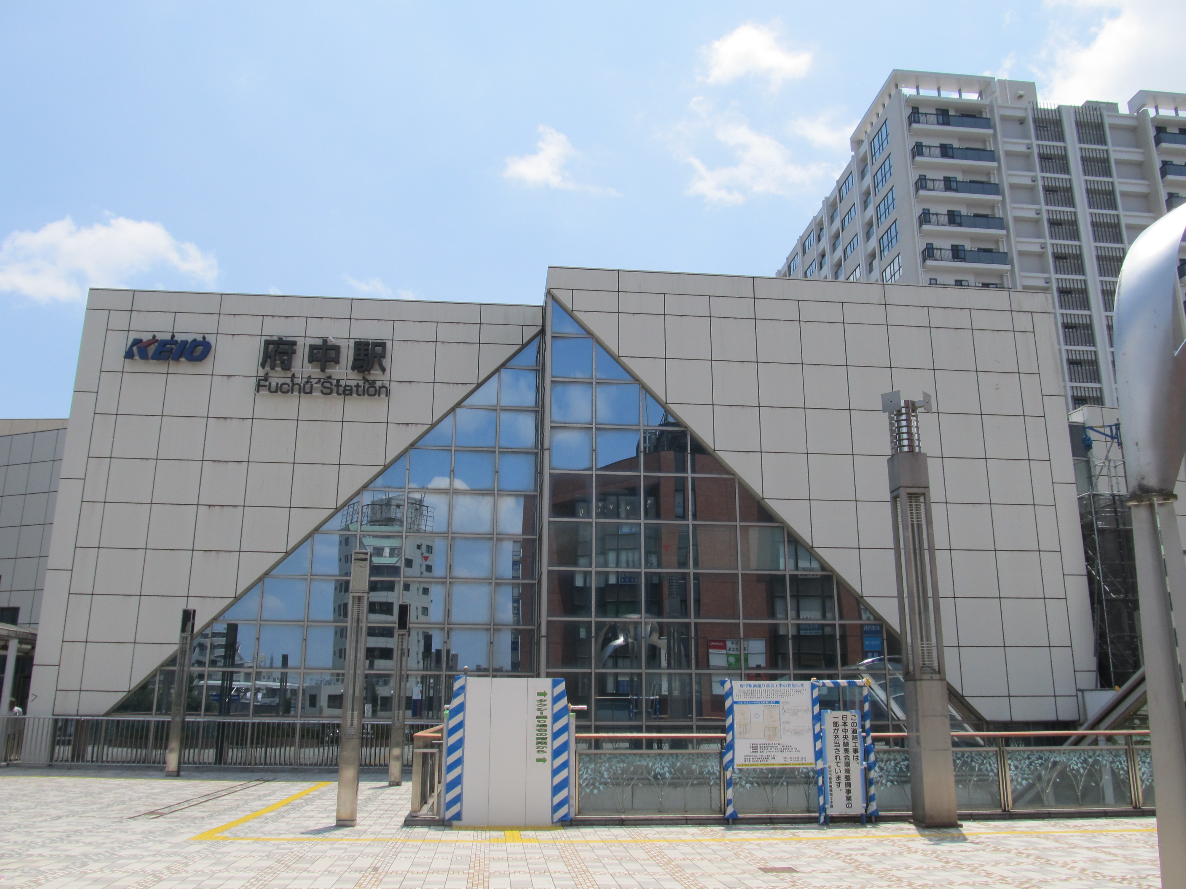 京王線府中駅北口